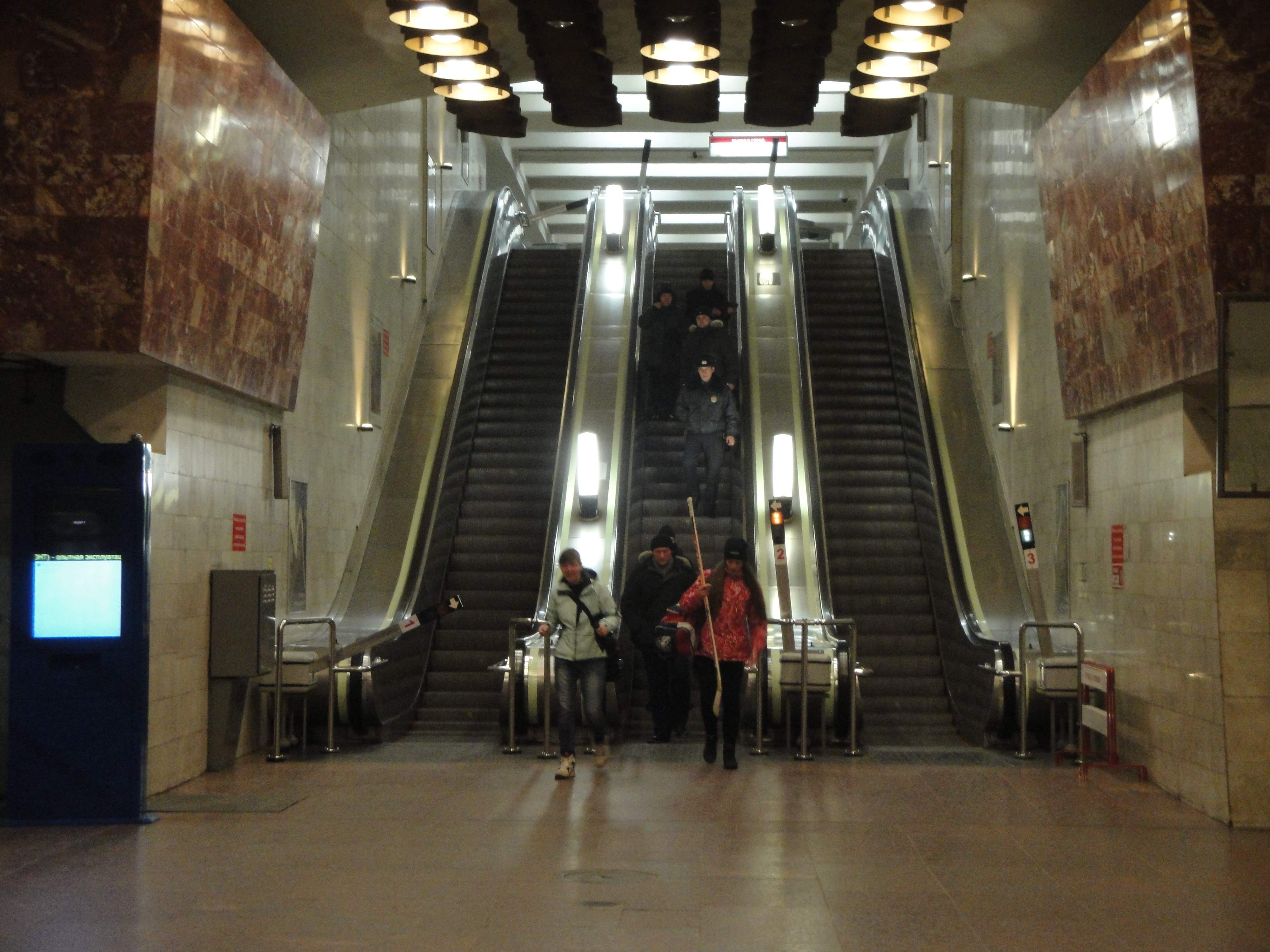 Станция метро «Заельцовская», Новосибирск. Эскалаторы.